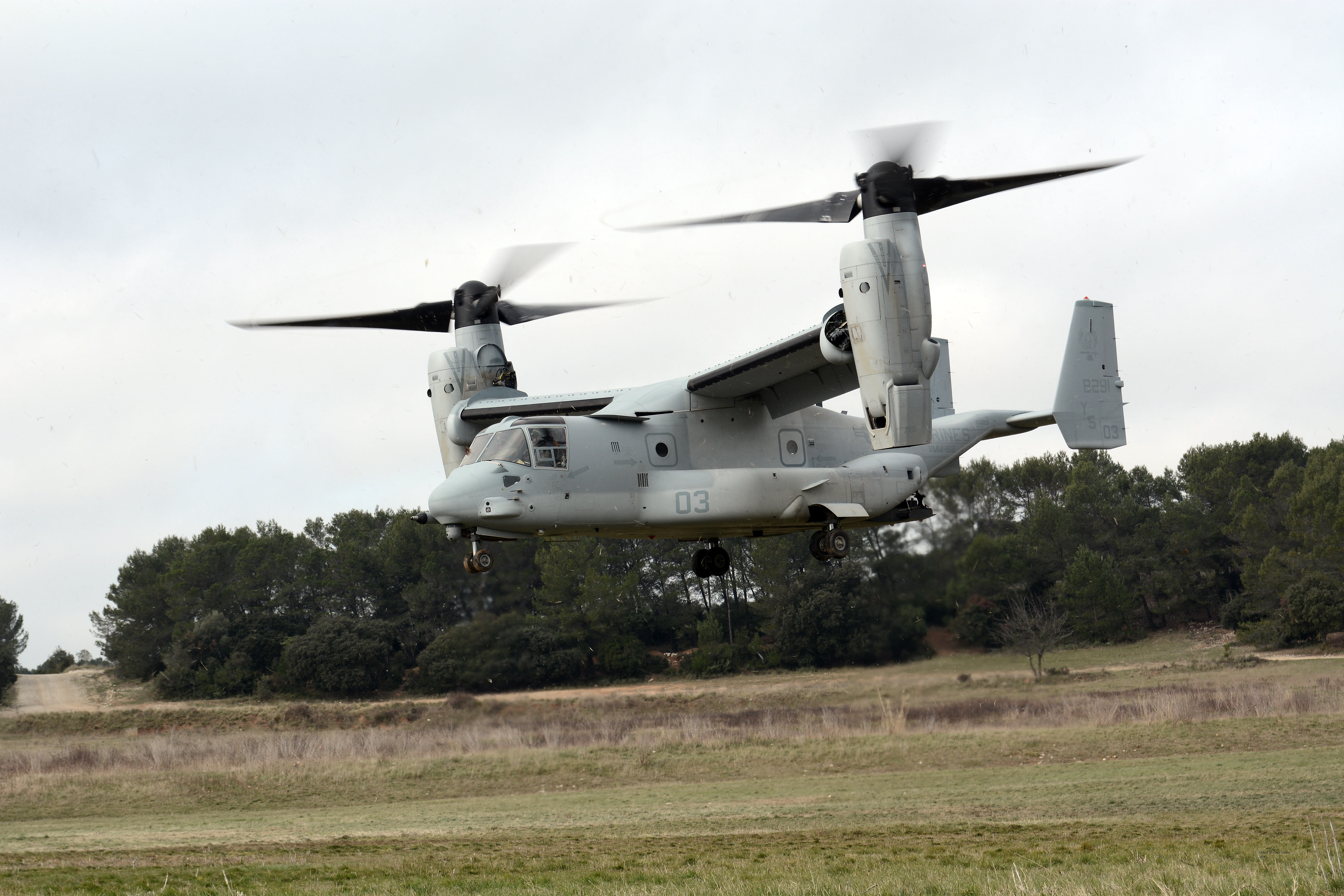 Hélicoptère V-22 du Marine Medium Tiltrotor Squadron 162 (VMM-162) s'apprêtant à déposer un élément de combat lors d'un exercice mixte (français du 21e RIMA et américains du 2nd recon Batallion du Corps des Marines).Camp des Garrigues, Nîmes. Photo : Adjudant Chef (H) Gérard Joyon